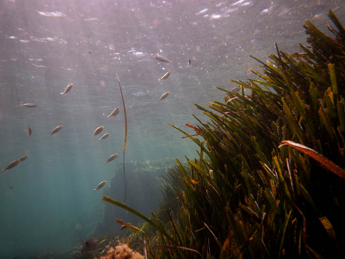 Posidonia oceanica en Cabo de Palos (Cartagena, Spain).